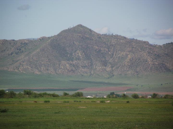 Монгол: Баян уул